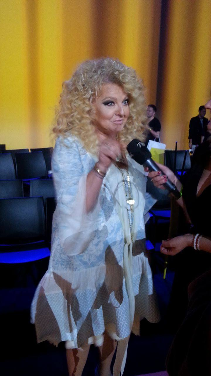 Magda Gessler, prowadząca program "Kuchenne rewolucje", podczas prezentacji jesiennej ramówki TVN w sierpniu 2016 roku.